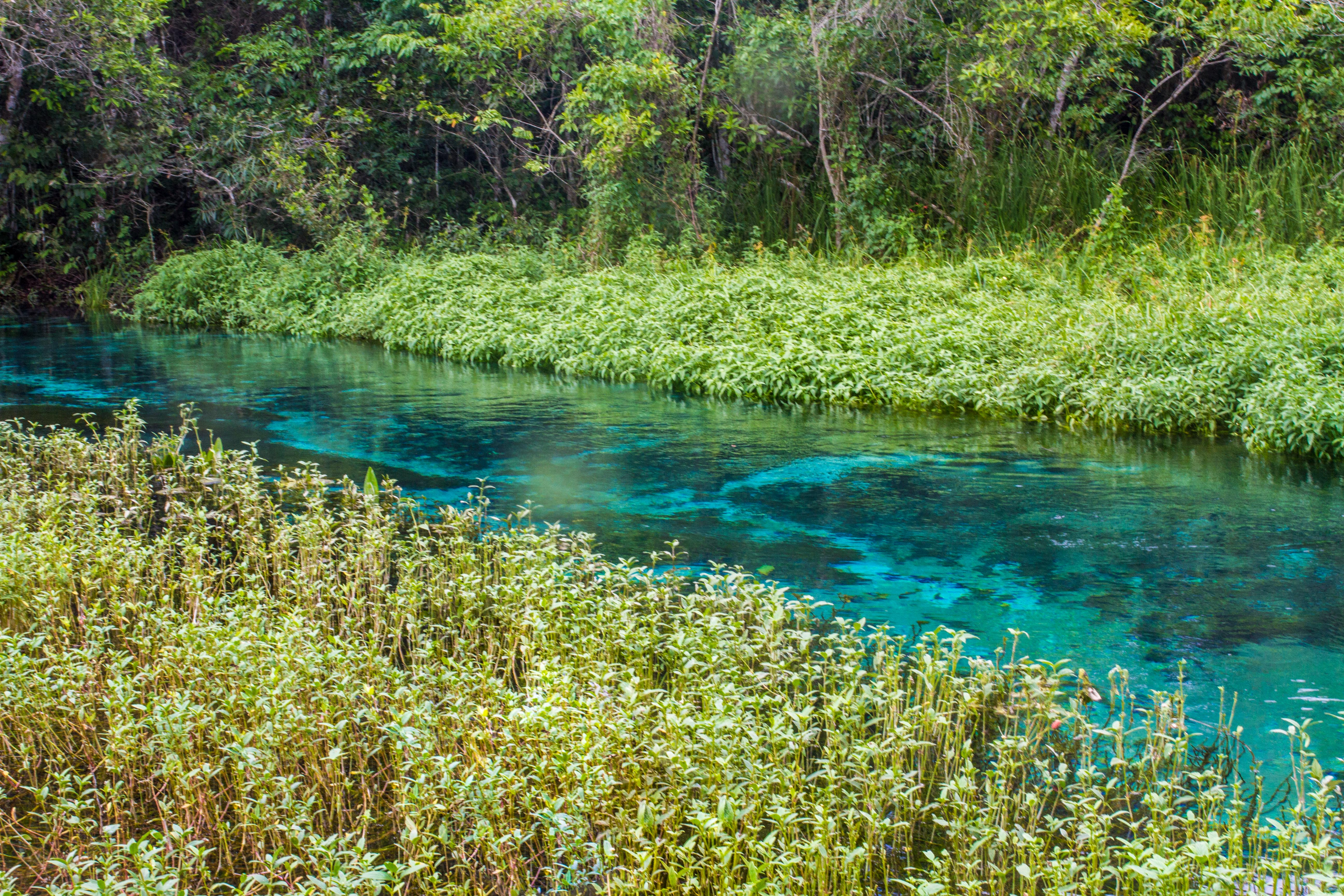 Barra do Sucuri em Bonito • Serra da Bodoquena.